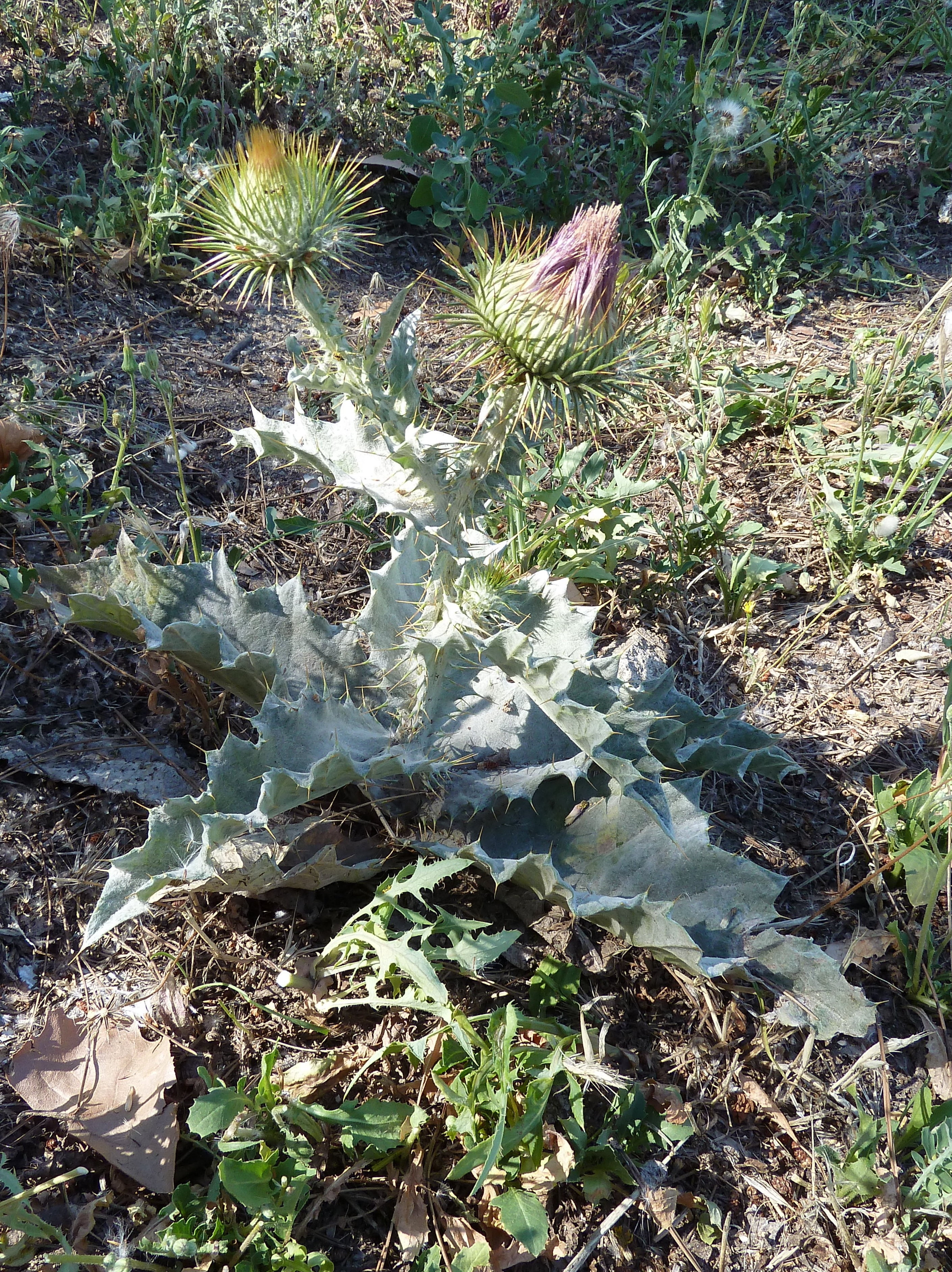 Onopordum acanthium var. schultesii - Vista general con un capítulo en post-floración, otro en pre-anresis y otro más en antesis a penas incipiente; tallos muy cortos y hojas densamente aracnosa-tomentosas. - Parque del Planetario, Madrid (España).